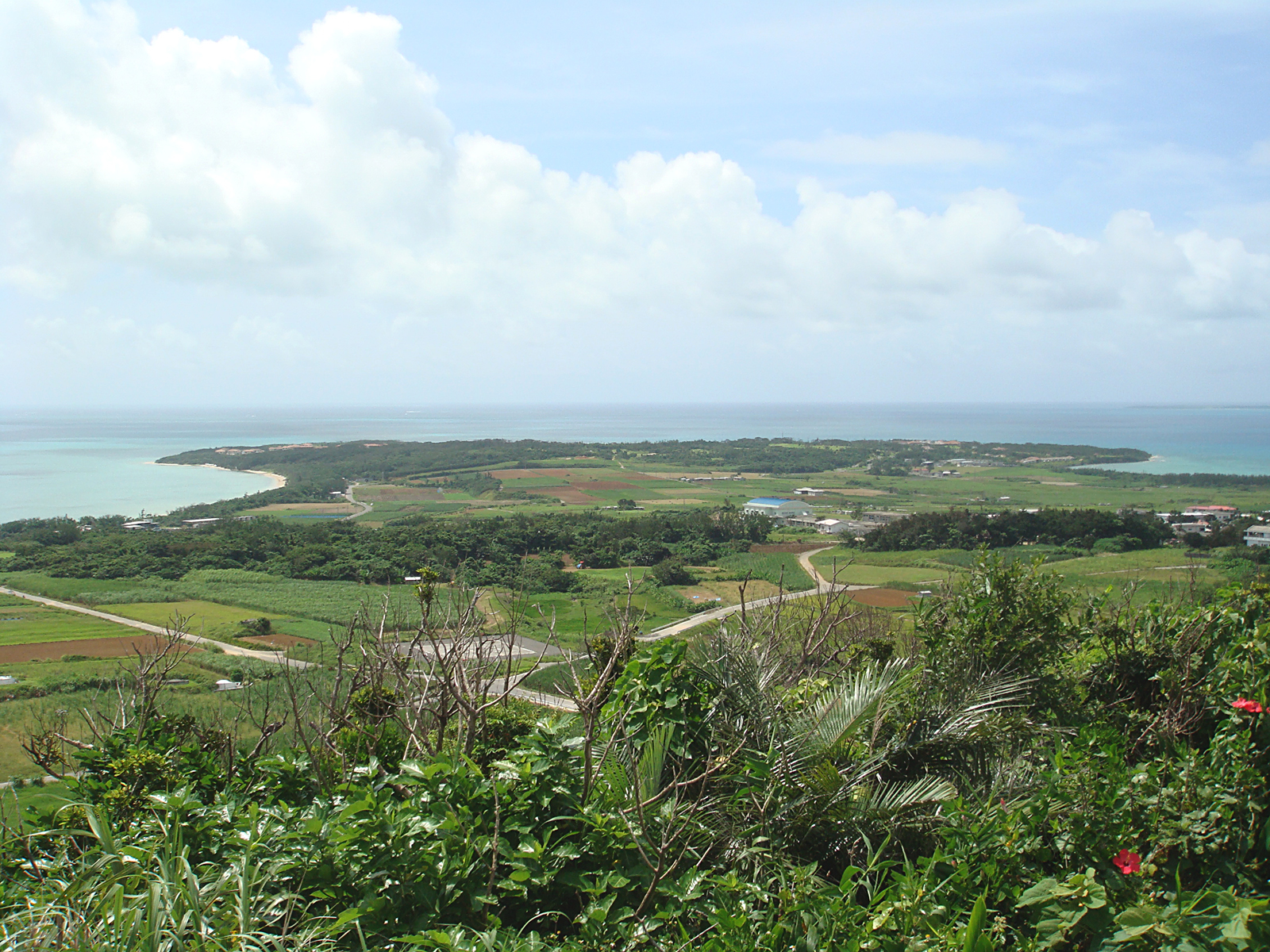 大岳からの小浜島南東方向の眺め（沖縄県八重山郡竹富町/小浜島）